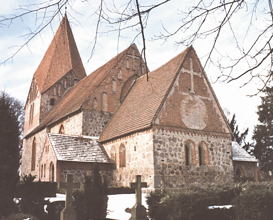 Dorfkirche in Bernitt, Mecklenburg-Vorpommern